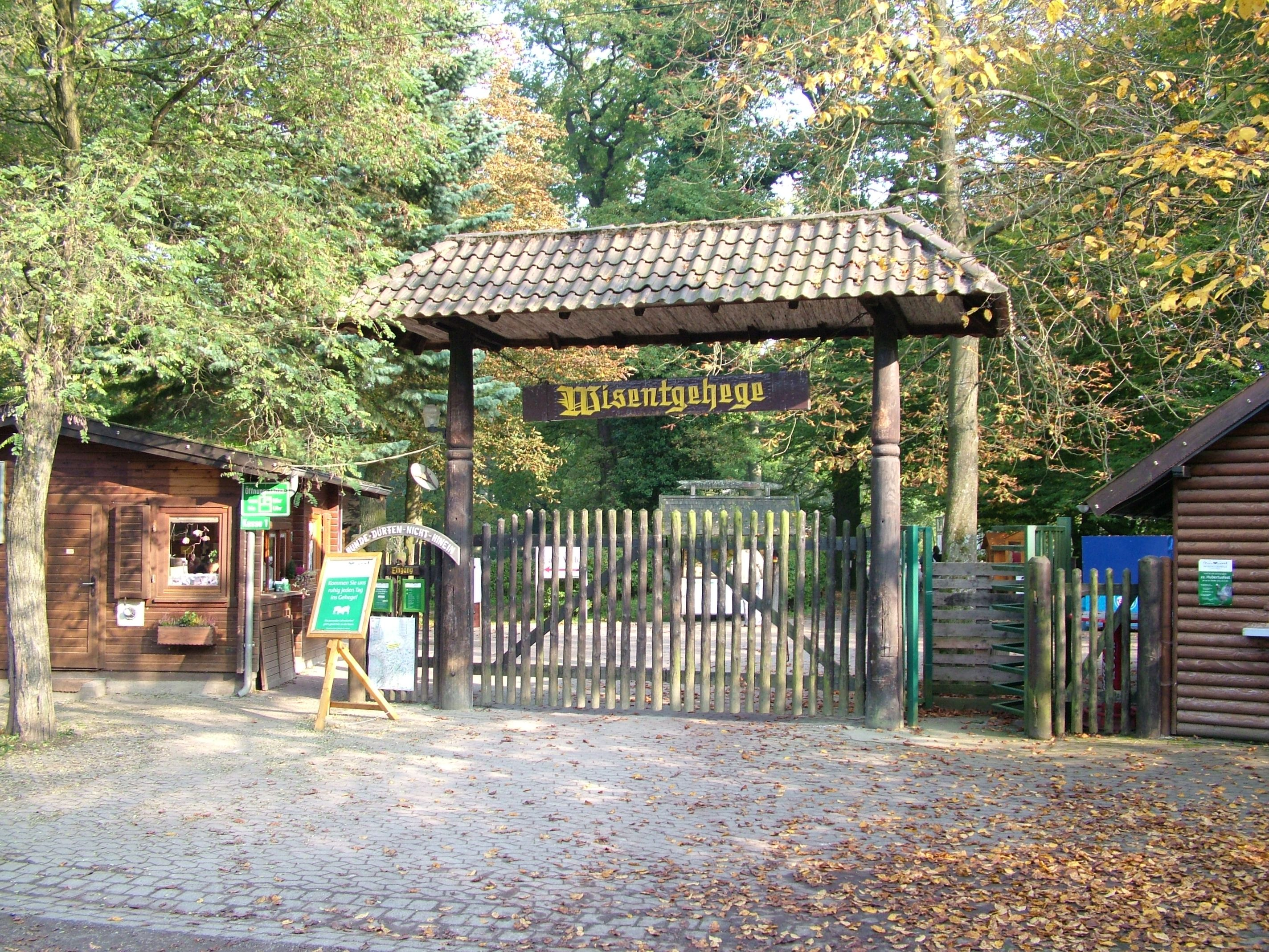 Springe, Niedersachsen, der Eingang des Wisentgeheges